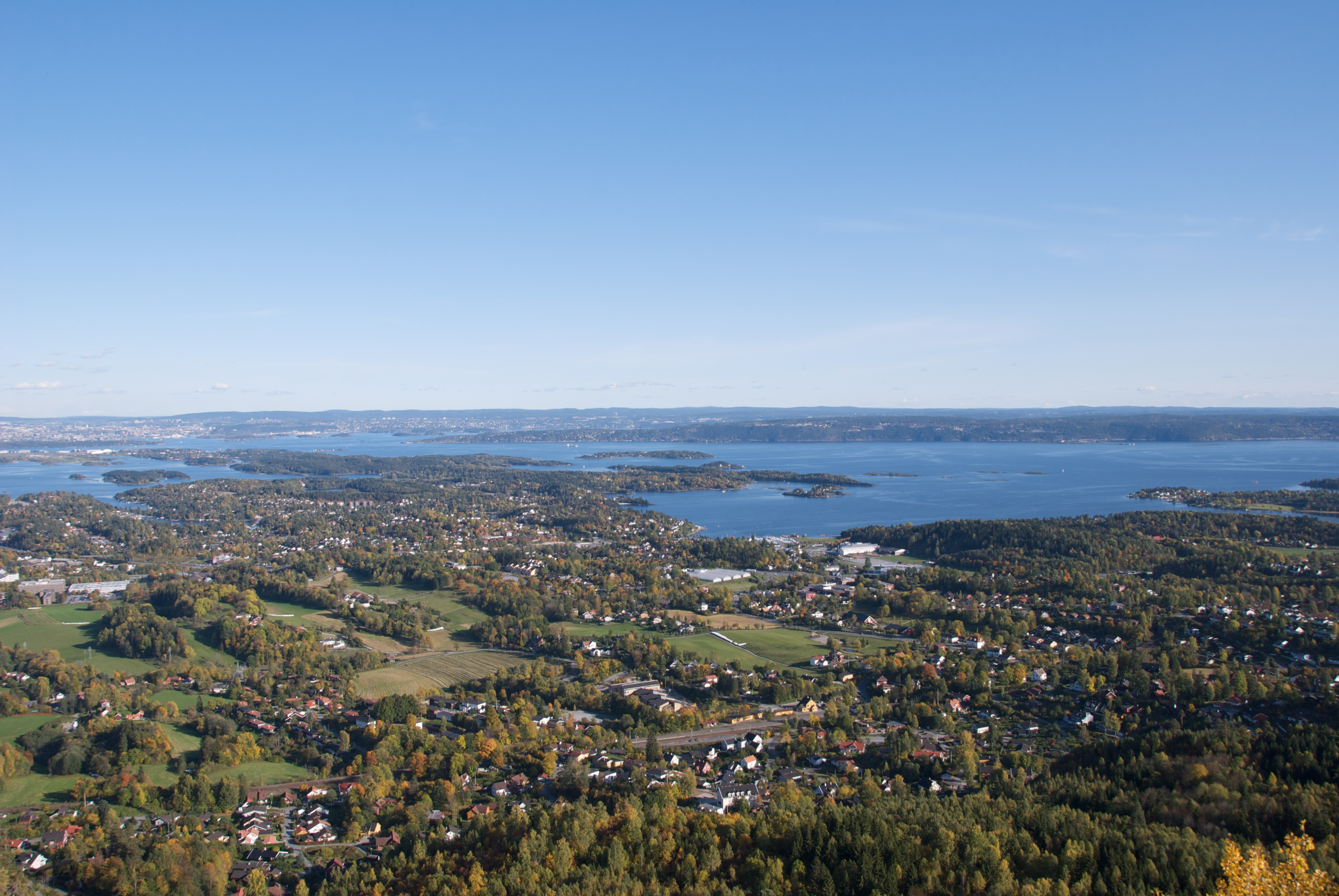 Utsikt fra Skaugumsåsen på Hvalstad i Asker kommune